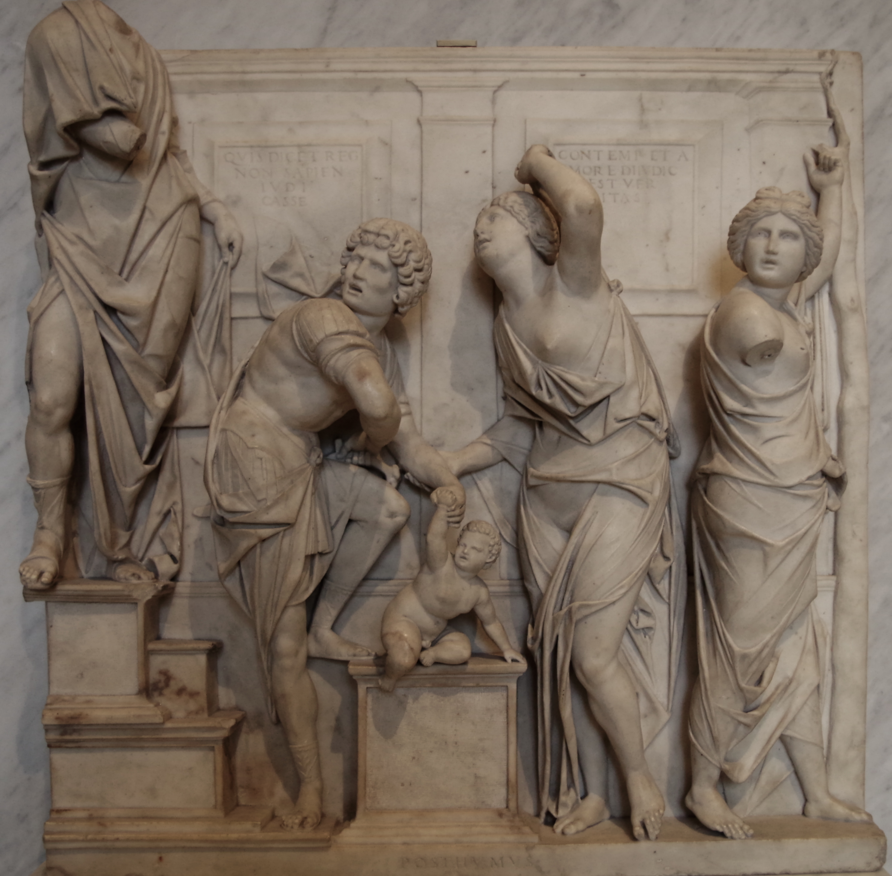 Le Jugement de Salomon - Giovanni Maria Mosca - R.F. 2029 - Louvre